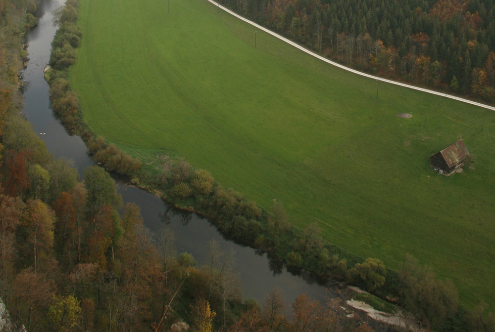 Valle del Alto Danubio / Oberdonautal